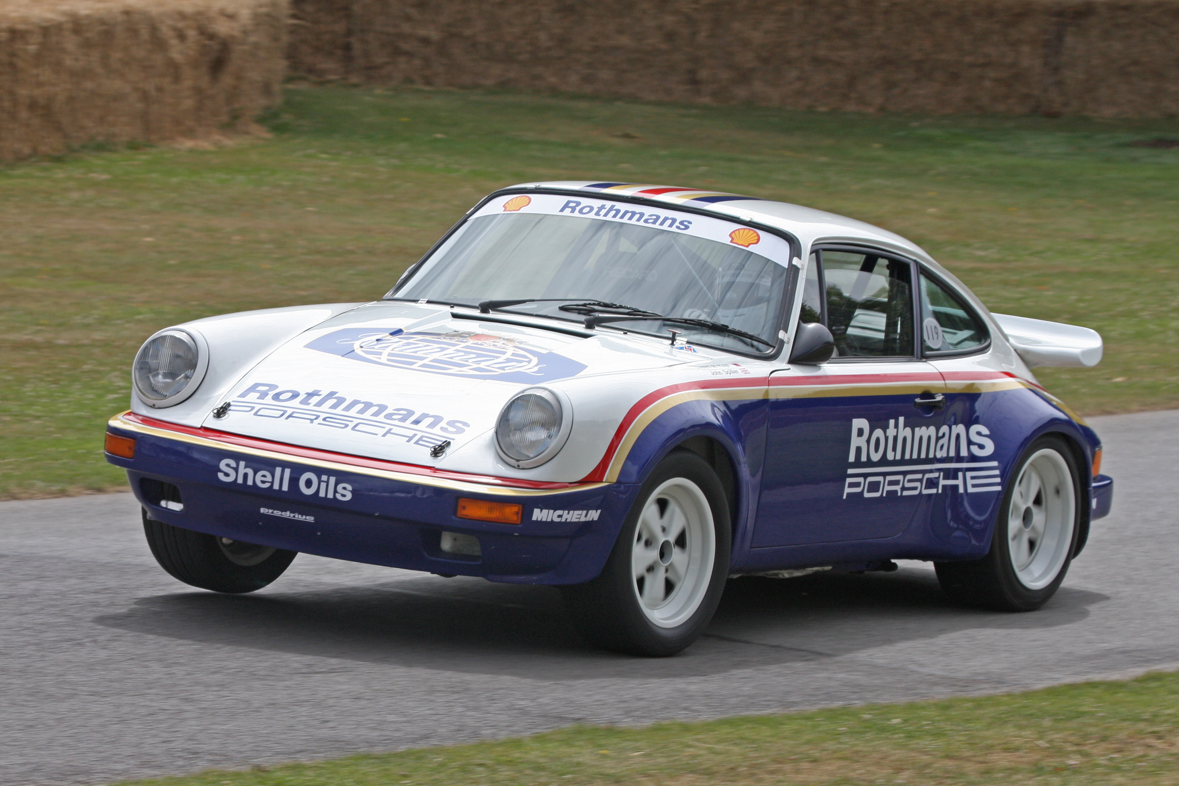 1984 Porsche 911 SCRS